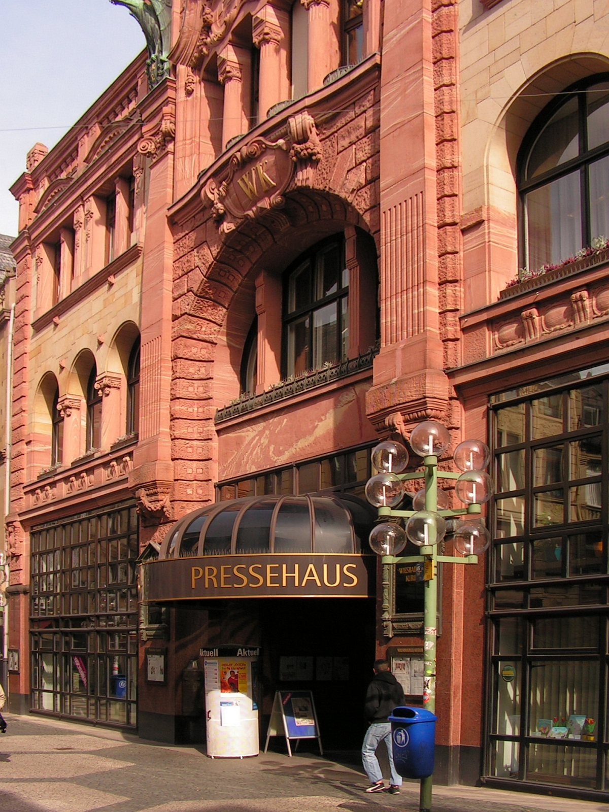 Wiesbaden Fußgängerzone - Fassade des Pressehauses Langgasse 21 Gebäude und Sitz der Tageszeitung Wiesbadener Kurier Zeitung Presse Verlag Medien Foto 2005 Wolfgang Pehlemann Wiesbaden PICT0009